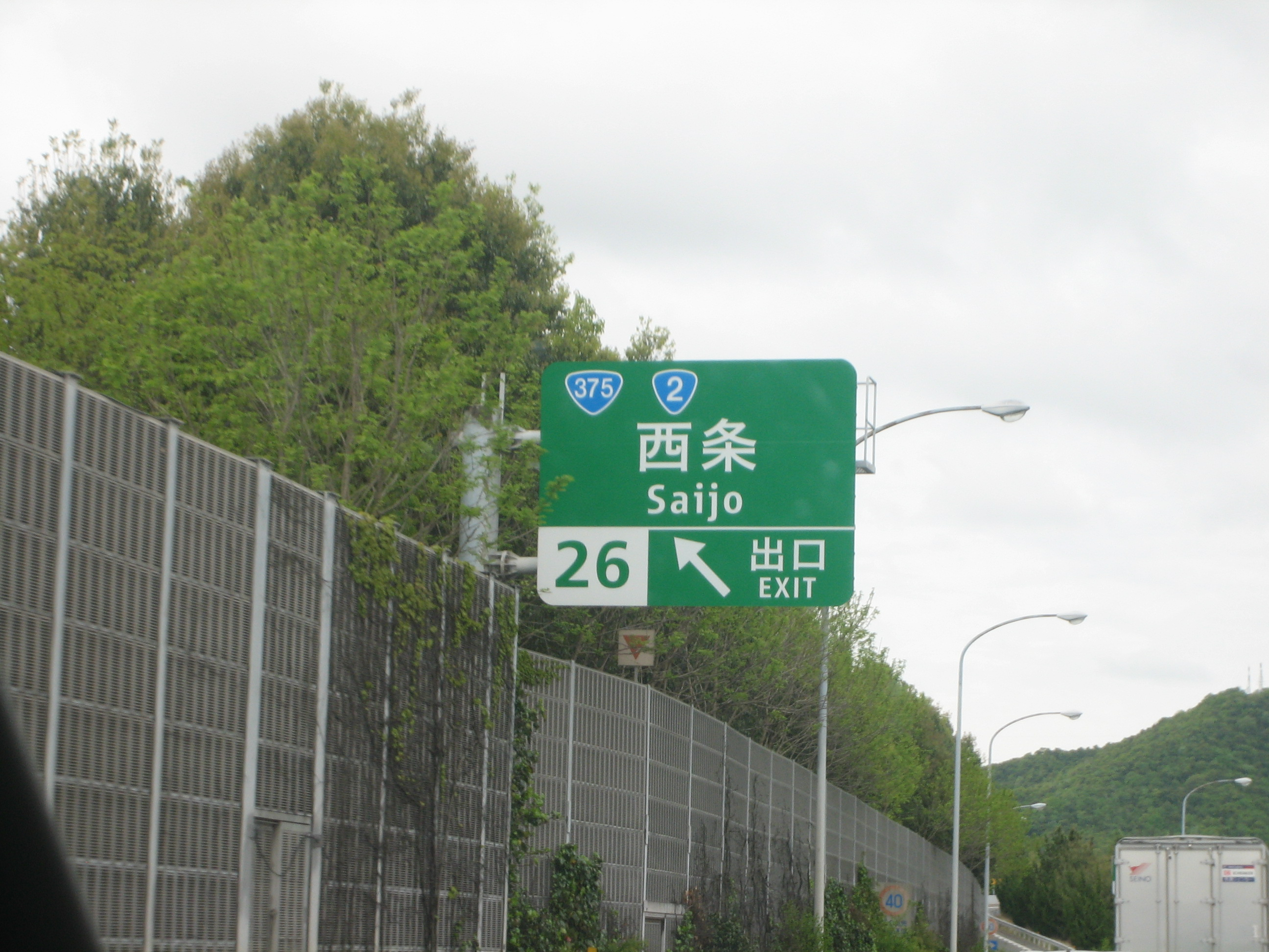 西条IC出口